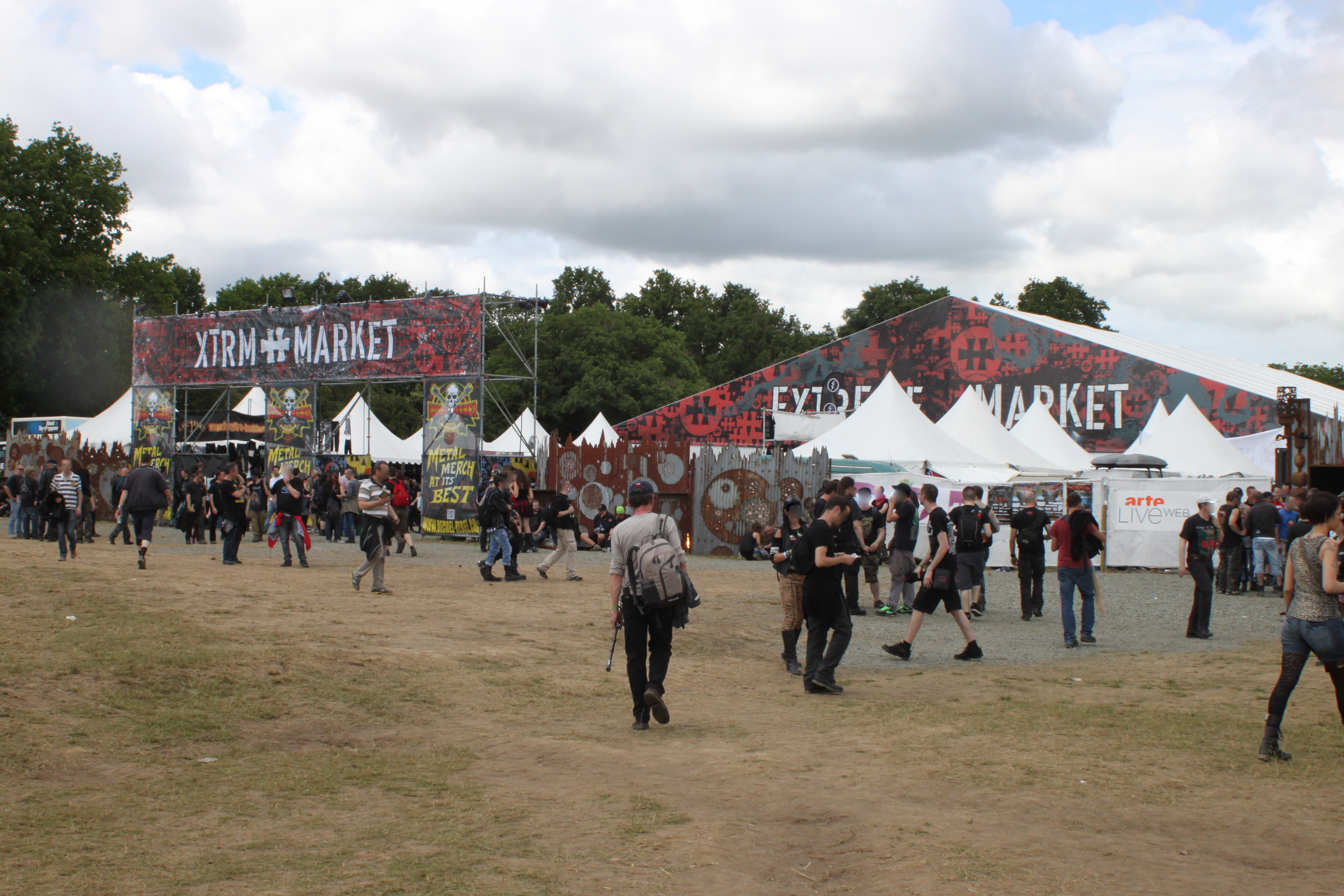 Extreme Market, Hellfest 2013, Fr-44, Clisson.